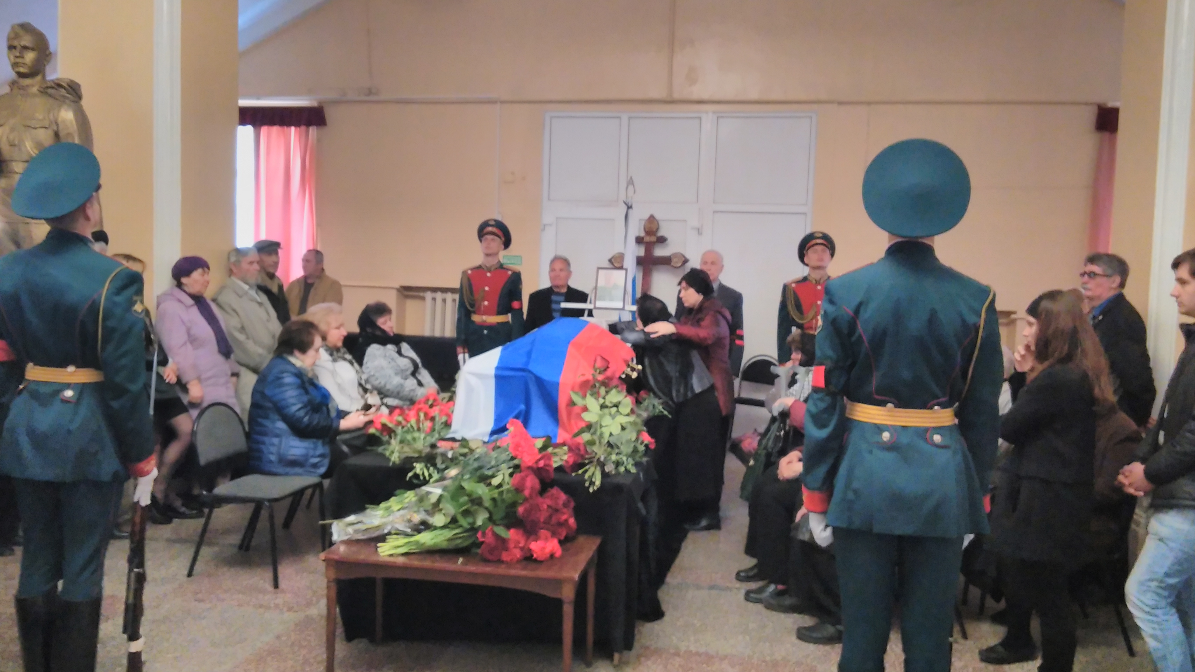 Воинские почести генерал-полковнику Овчинникову А. И. Окружной дом офицеров, Ростов-на-Дону 2017 год.